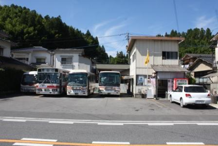 日田バス玖珠営業区